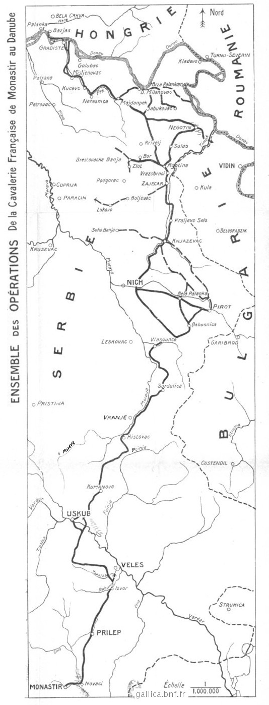 extrait du livre de François Léon Jouinot-Gambetta.